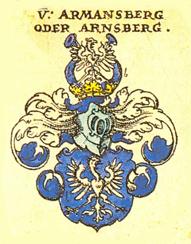 Wappen der Bayerischen Adelsfamilie Armansperg